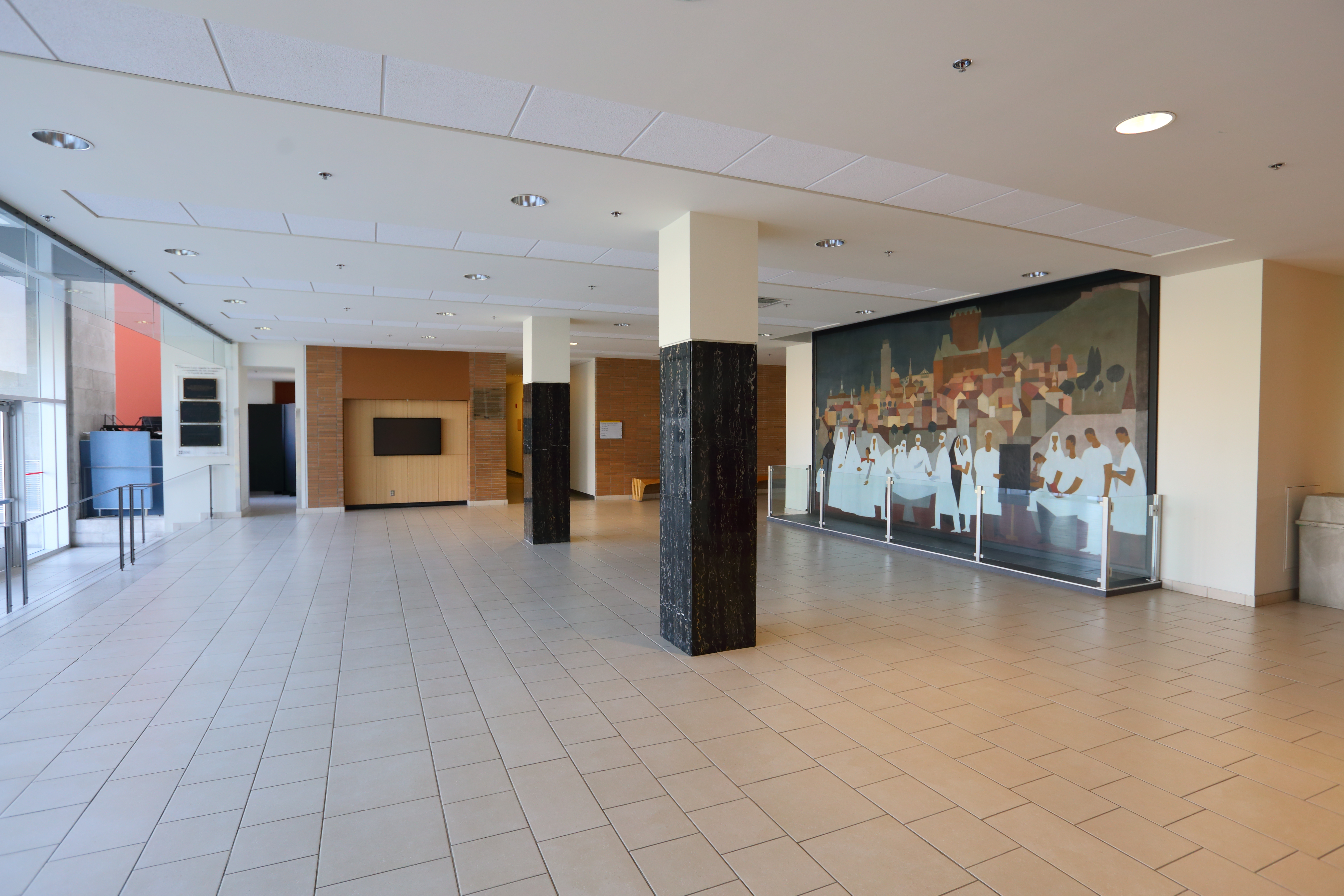 La peinture illustre l'histoire de la Médecine à Québec. En arrière plan est représentée le Vieux-Québec, foyer d'origine de la Faculté de médecine de l'Université Laval. Au premier plan sont représentés dix-neuf personnages rattachés au monde médical : religieuses, chirurgiens, infirmières, professeurs, étudiants, internes et patients.